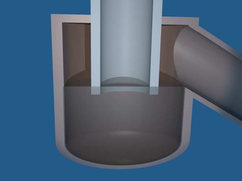 Sifon (badkamermodel) schematisch in doorsnede